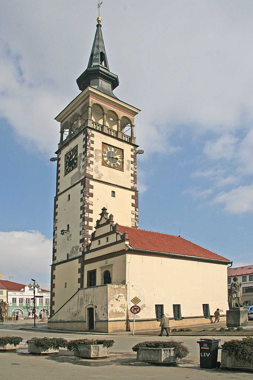 Dobruška, okres Rychnov nad Kněžnou. Radnice.